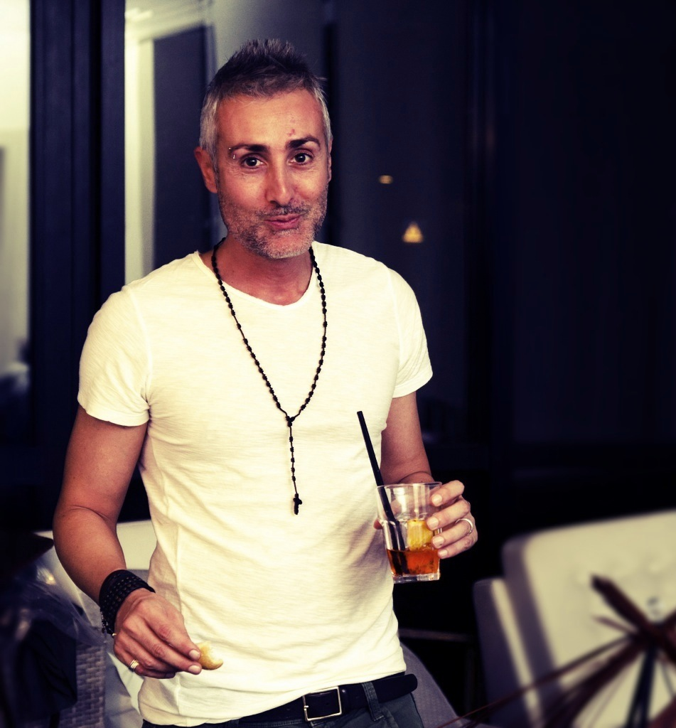 Foto del regista Giuseppe Ferlito